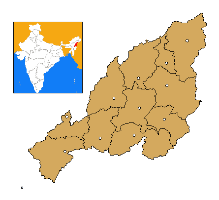 Mapa de localización de Nagaland